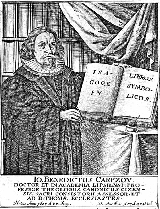 Johann Benedikt Carpzov I. (1607-1657) war ein deutscher evangelischer Theologe